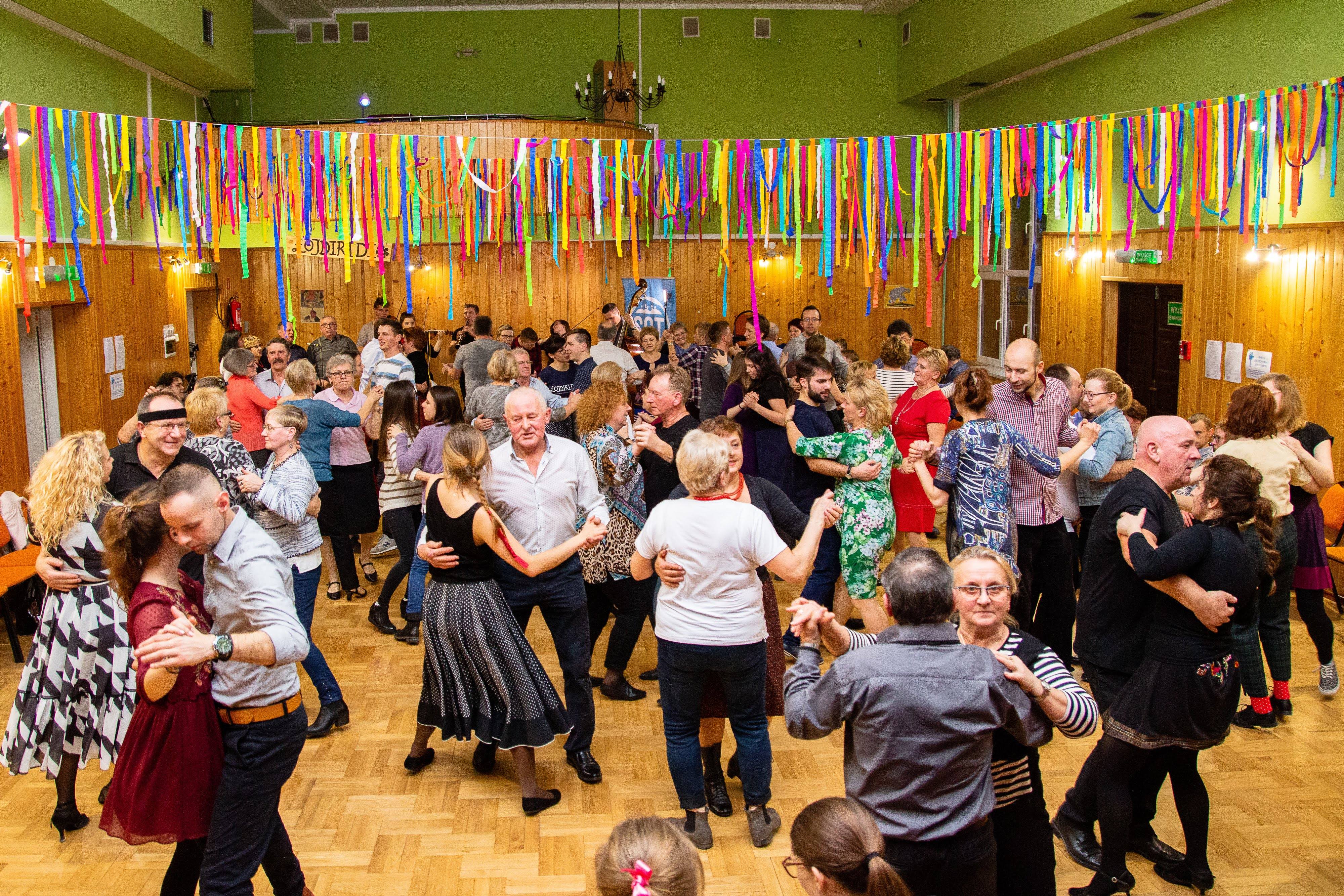 Zdjęcie z potańcówki - do tańca gra Kapela "Iskierczanie"